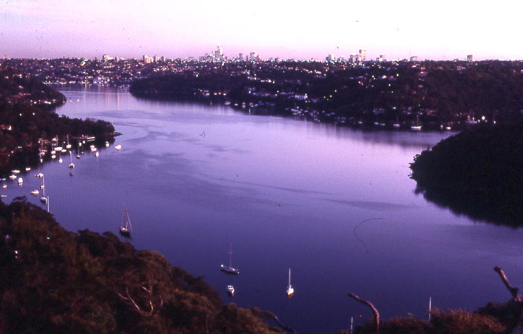 middle harbour, sydney